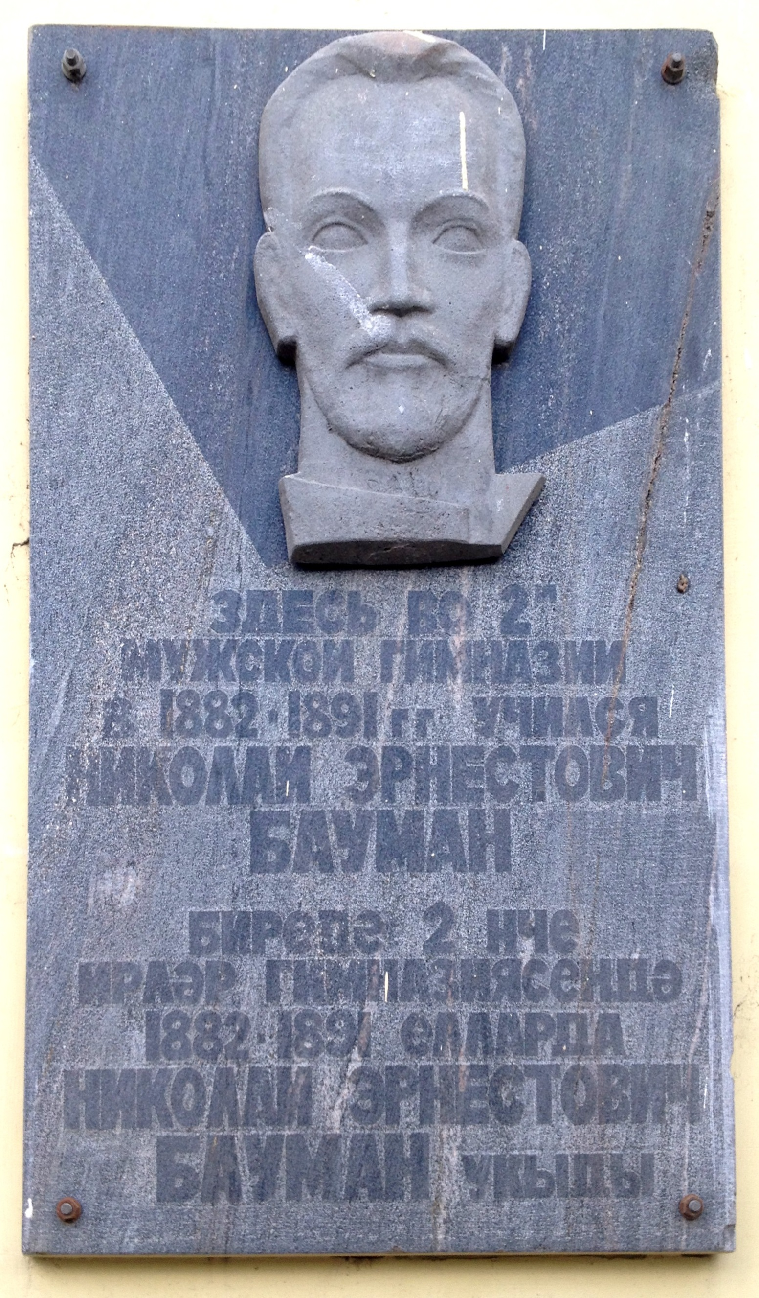 Здание, где во 2-й мужской гимназии учился революционер Бауман Н.Э.: улица Лево-Булачная, 48/1, Казань, Татарстан